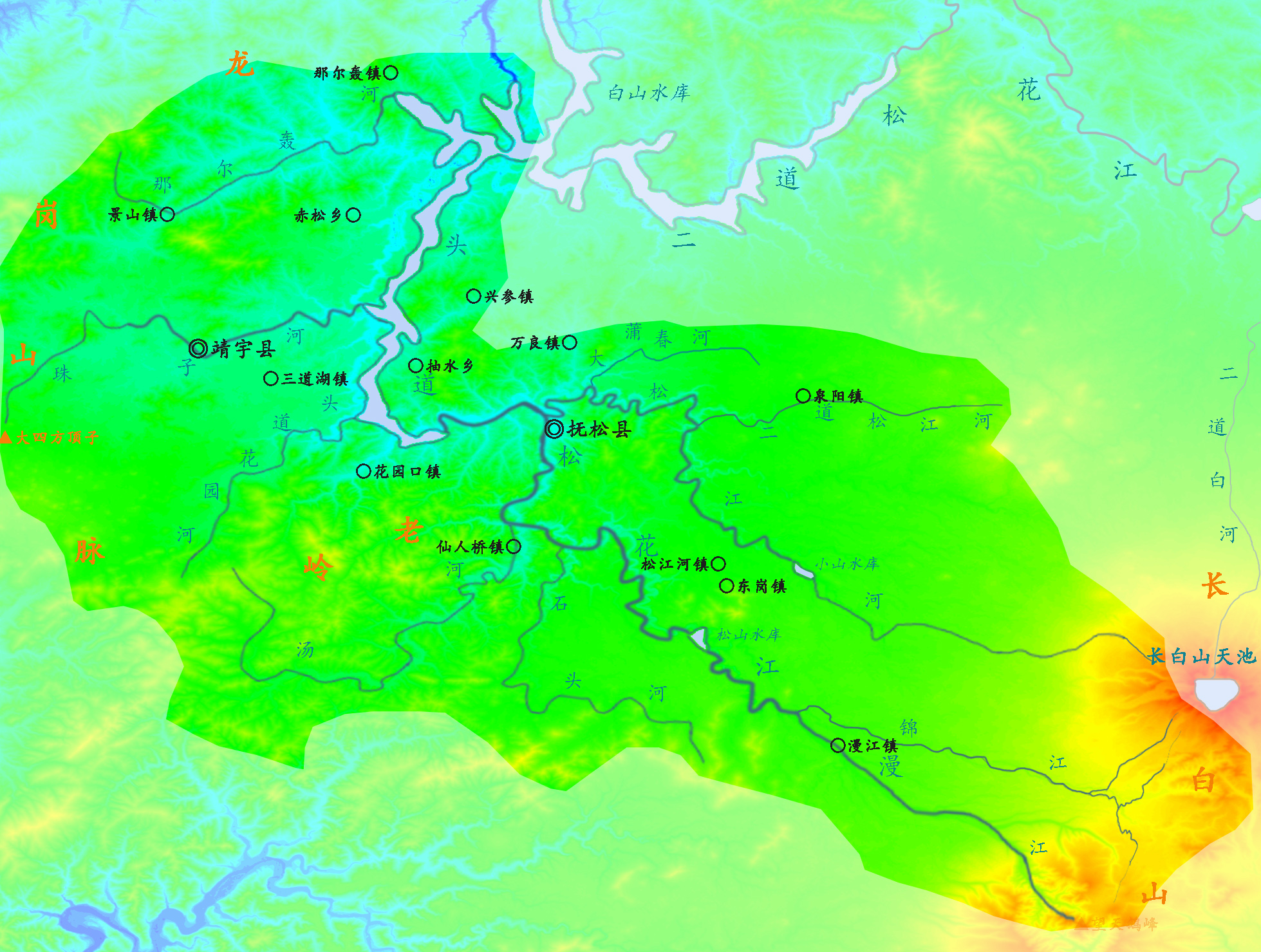 头道松花江流域图。根据《中国河湖大典·黑龙江 辽河卷》绘制